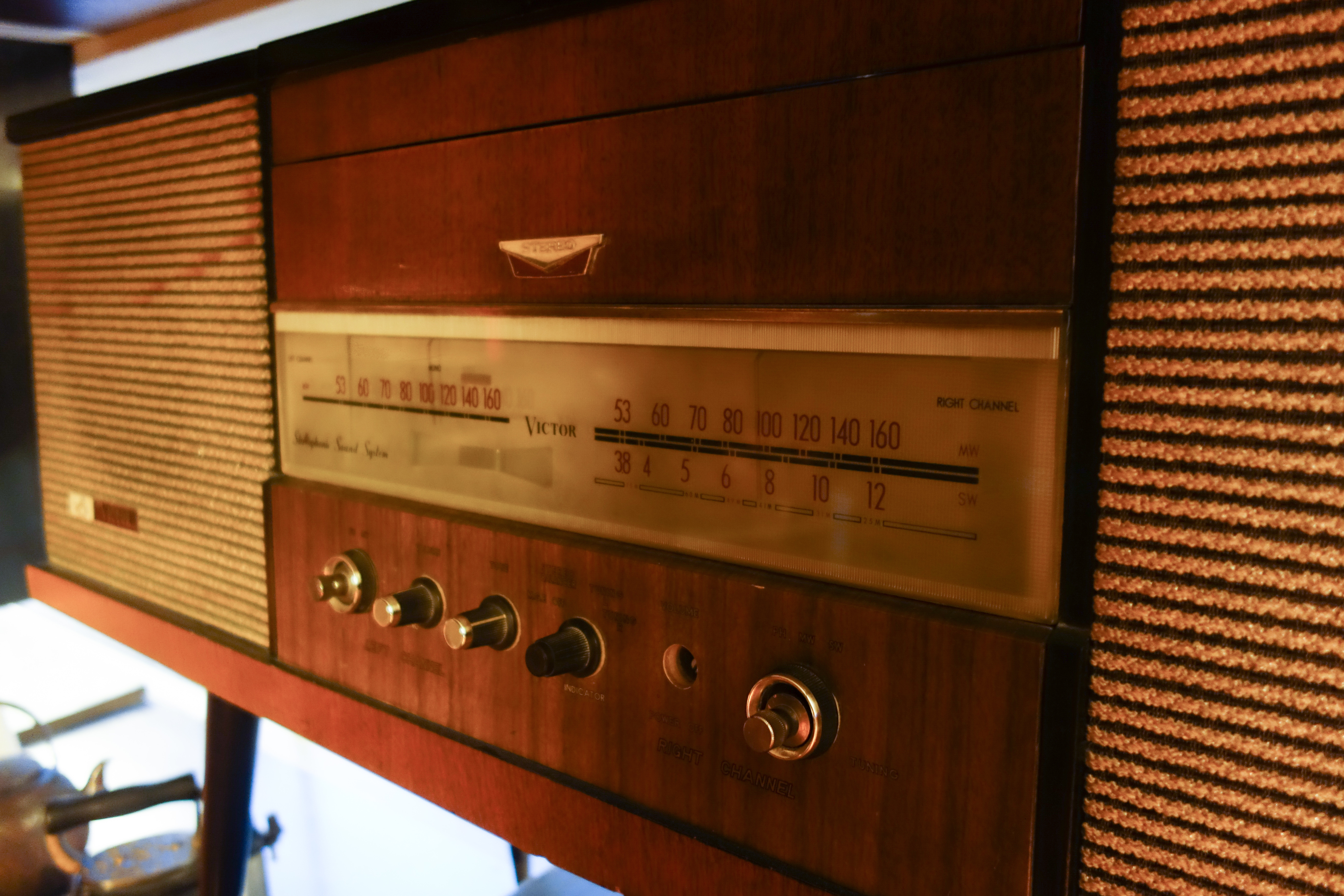 2つの周波数によるステレオ放送（AM）対応の、ラジオ受信機 （ビクター、「小樽旅亭 藏群」所蔵）